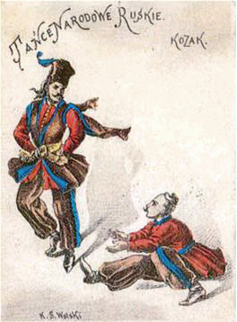 Народный русский танец «Козак»